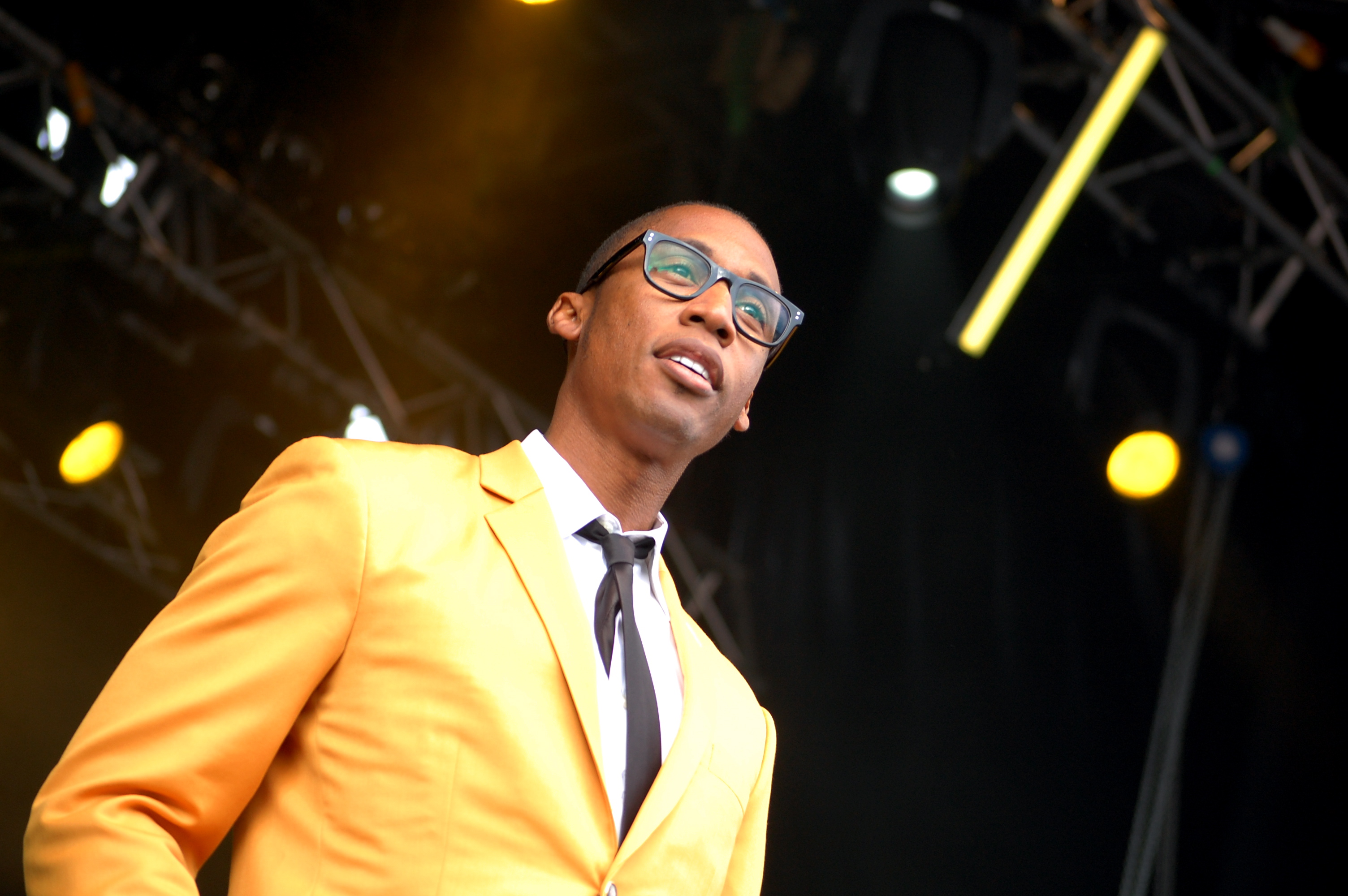 Raphael Saadiq performing at the 2009 Stockholm Jazz Festival, Stockholm, Sweden.